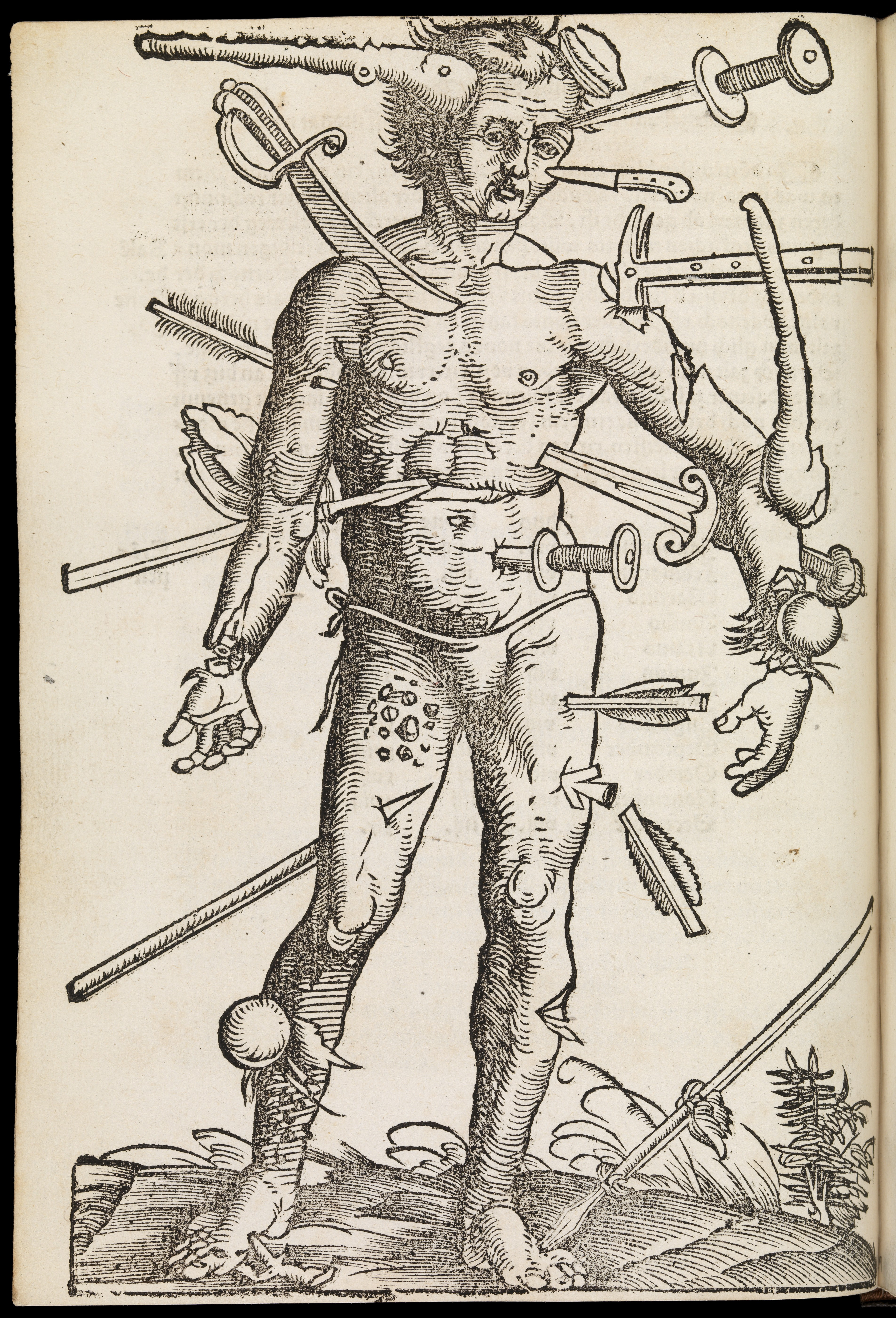 Feldtbuch der Wundartzney, newlich getruckt und gebessert. Wound-man. Rare Books